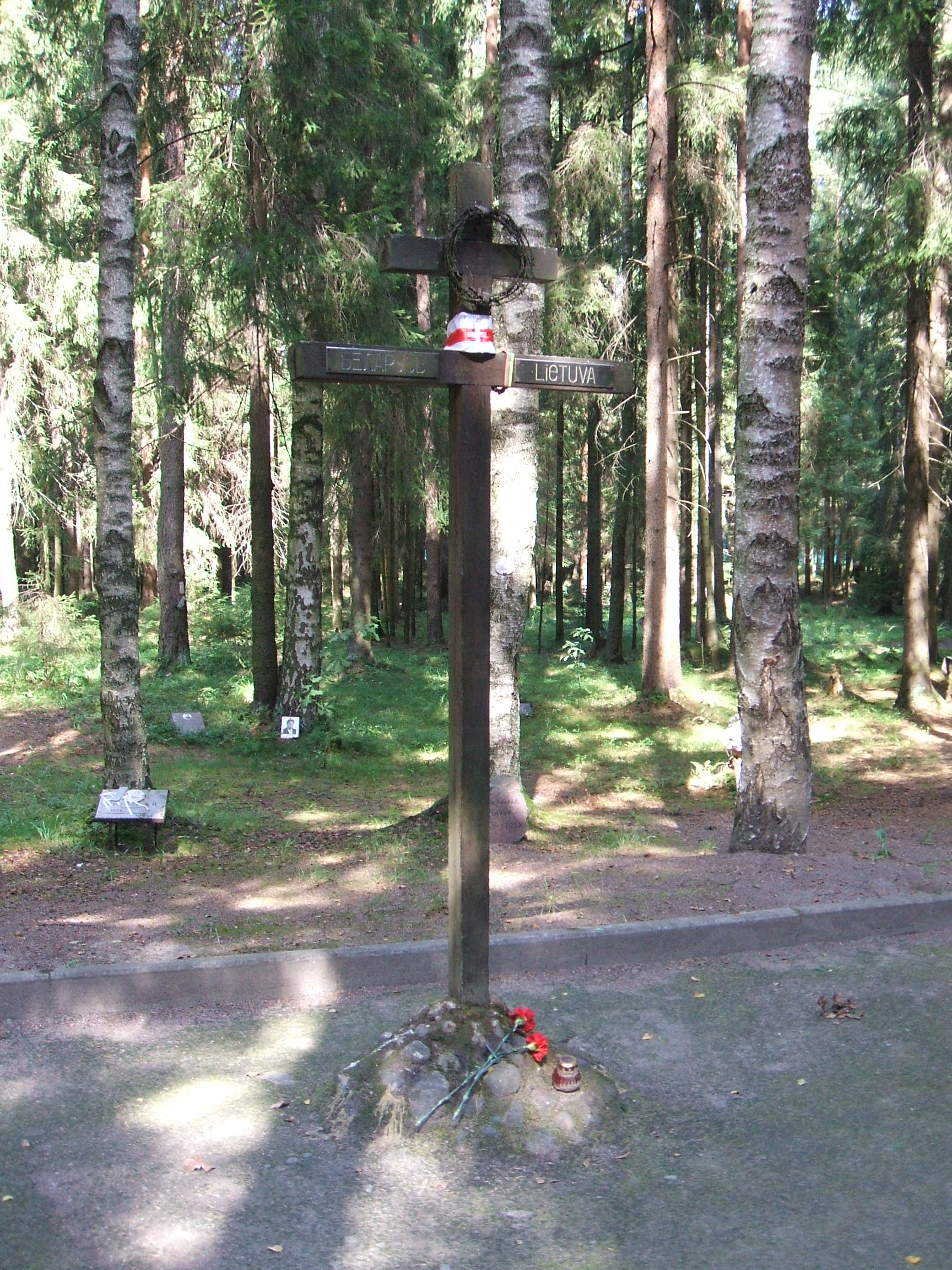 Памятники Левашовской пустоши